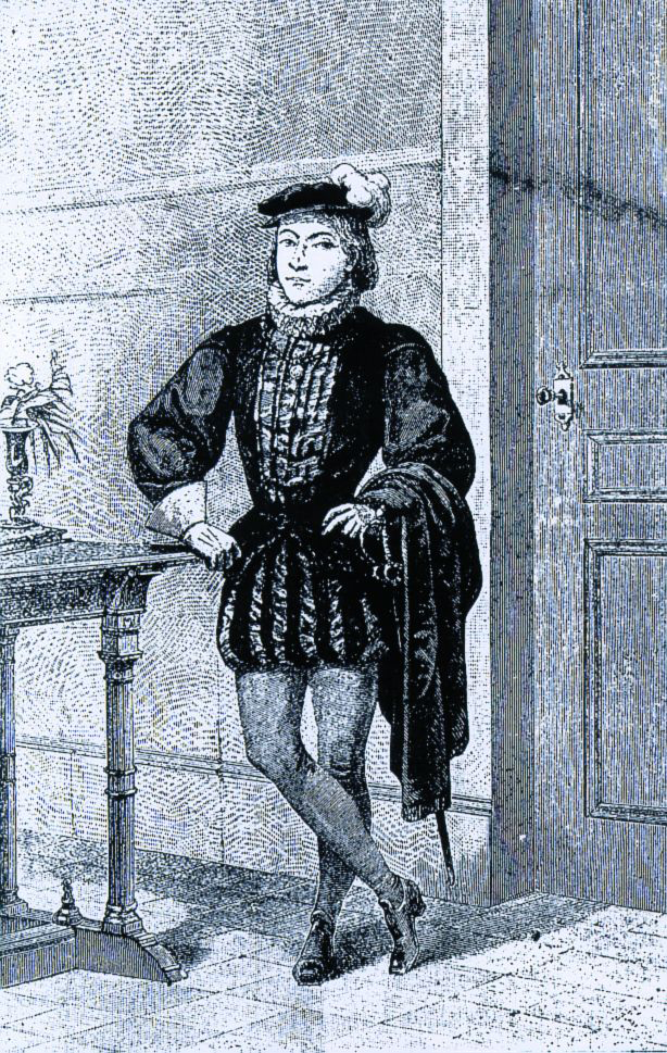 Summary Franz von Sales im Alter von 12 Jahren